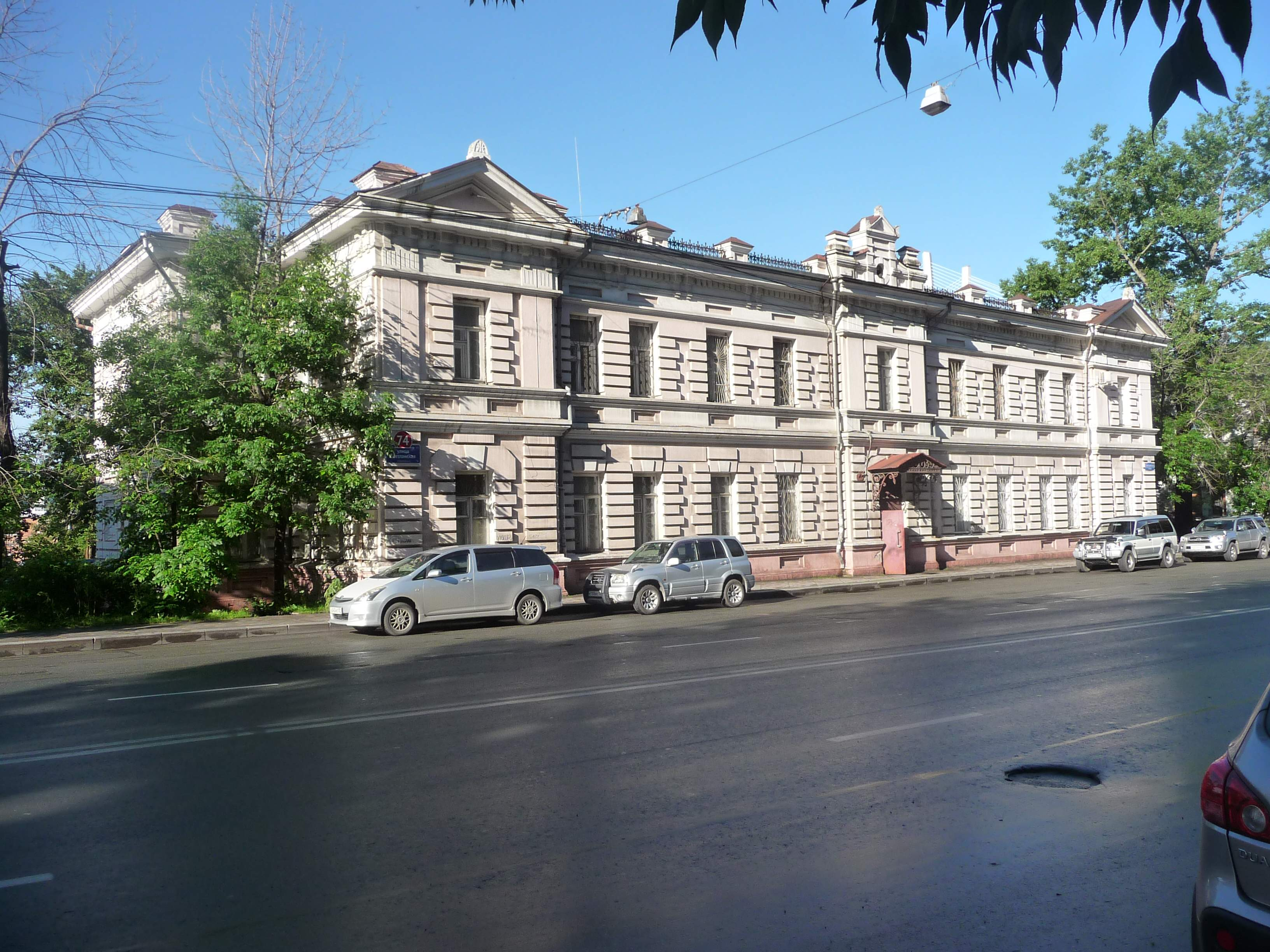 Владивосток, Светланская, 74, 2015-06-30